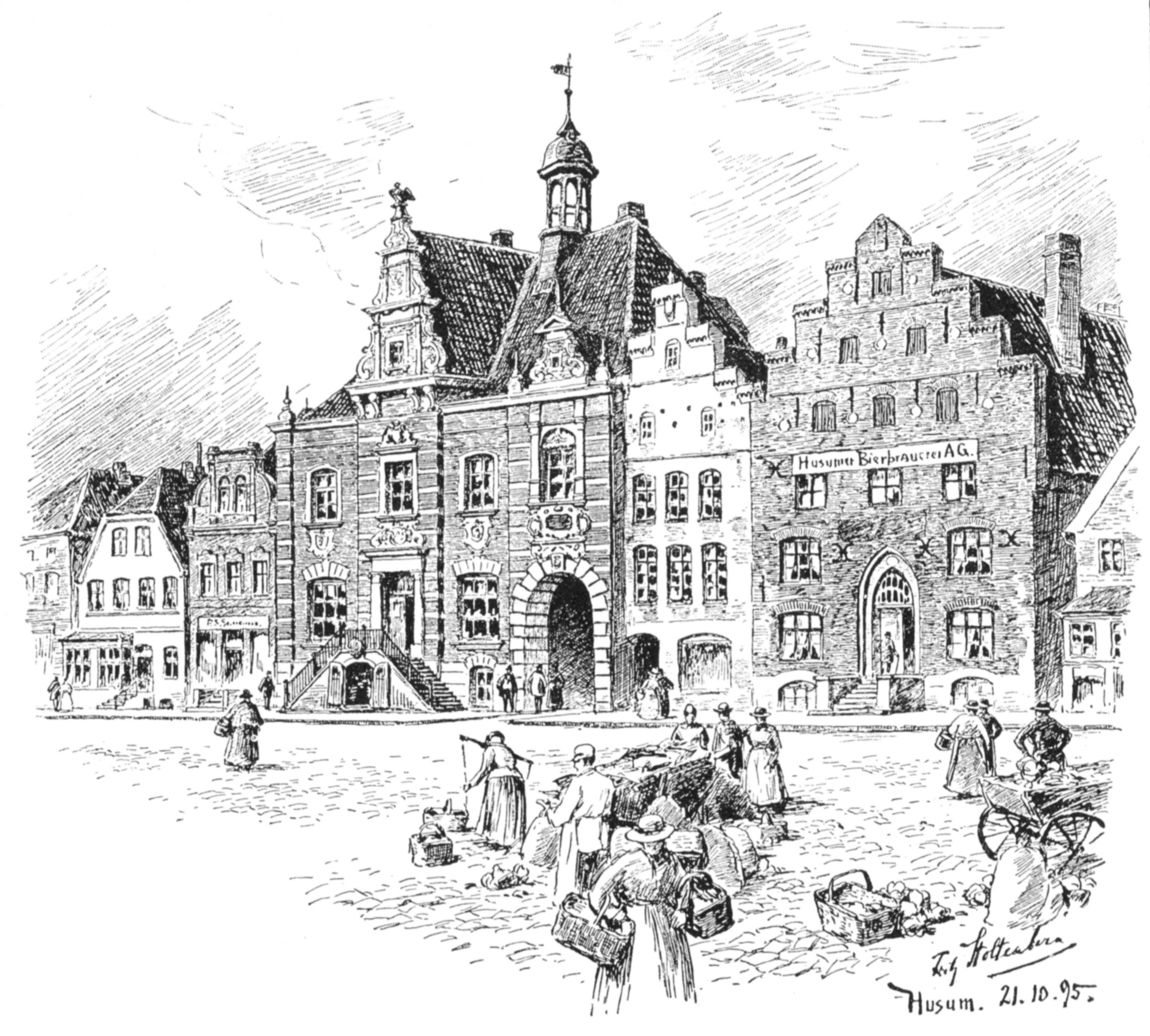 Der Marktplatz mit dem Rathaus in Husum um 1895, Zeichnung von Fritz Stoltenberg.